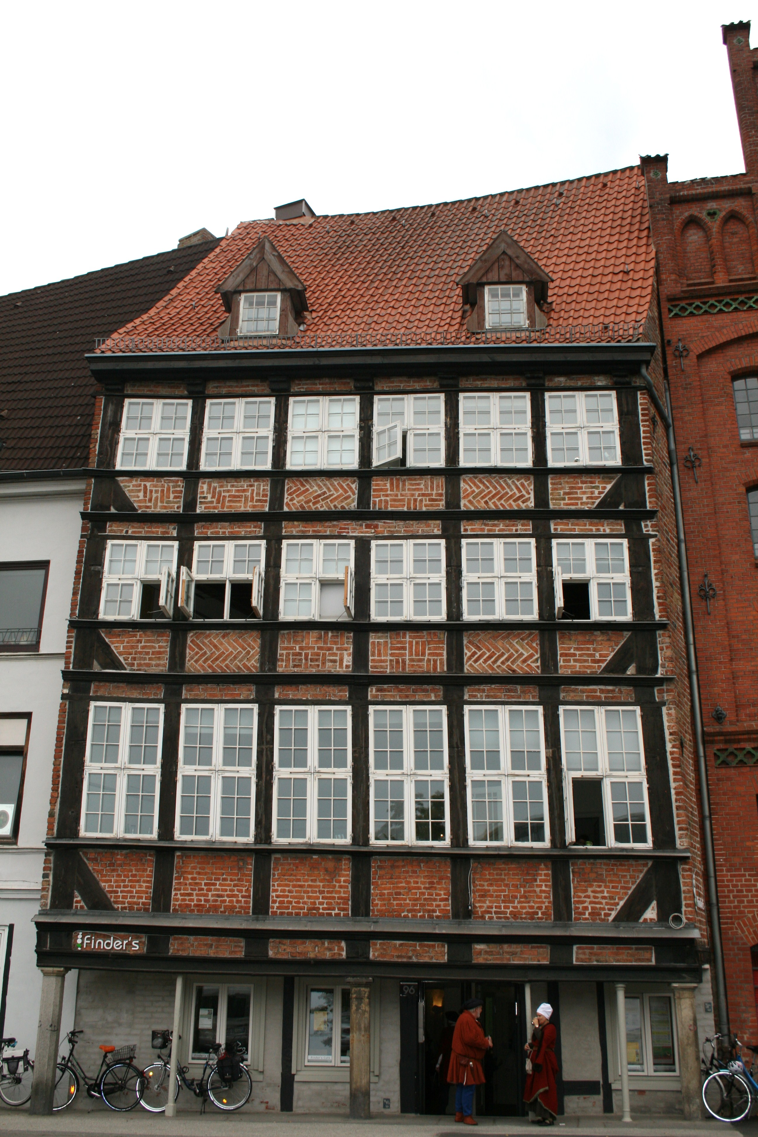 Lübeck An der Untertrave 96